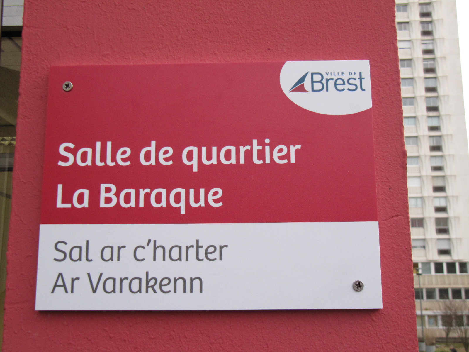 Pancarte Bilingue Français/Breton sur un bâtiment communal brestois